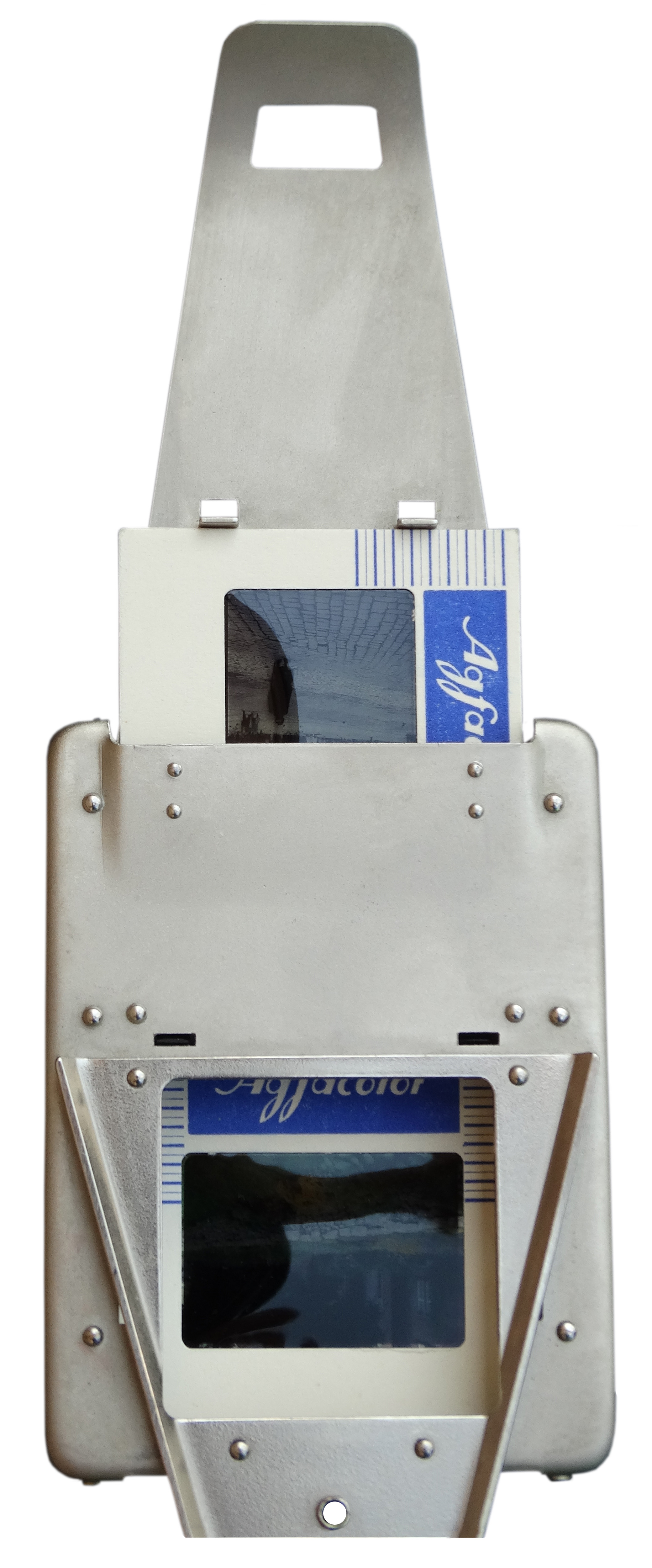 Mit dem manuellen Diawechsler vom Aspectar 150 können Kleinbilddias mit Papier- oder mit Kunststoffrahmen projiziert werden. Die Schärfte des Projektionsbildes muss wegen der Lageänderung des Dias in seinem Rahmen meisten nachgeregelt werden. Bei eingeglasten Kleinbilddias entfällt diese Nachregelung.